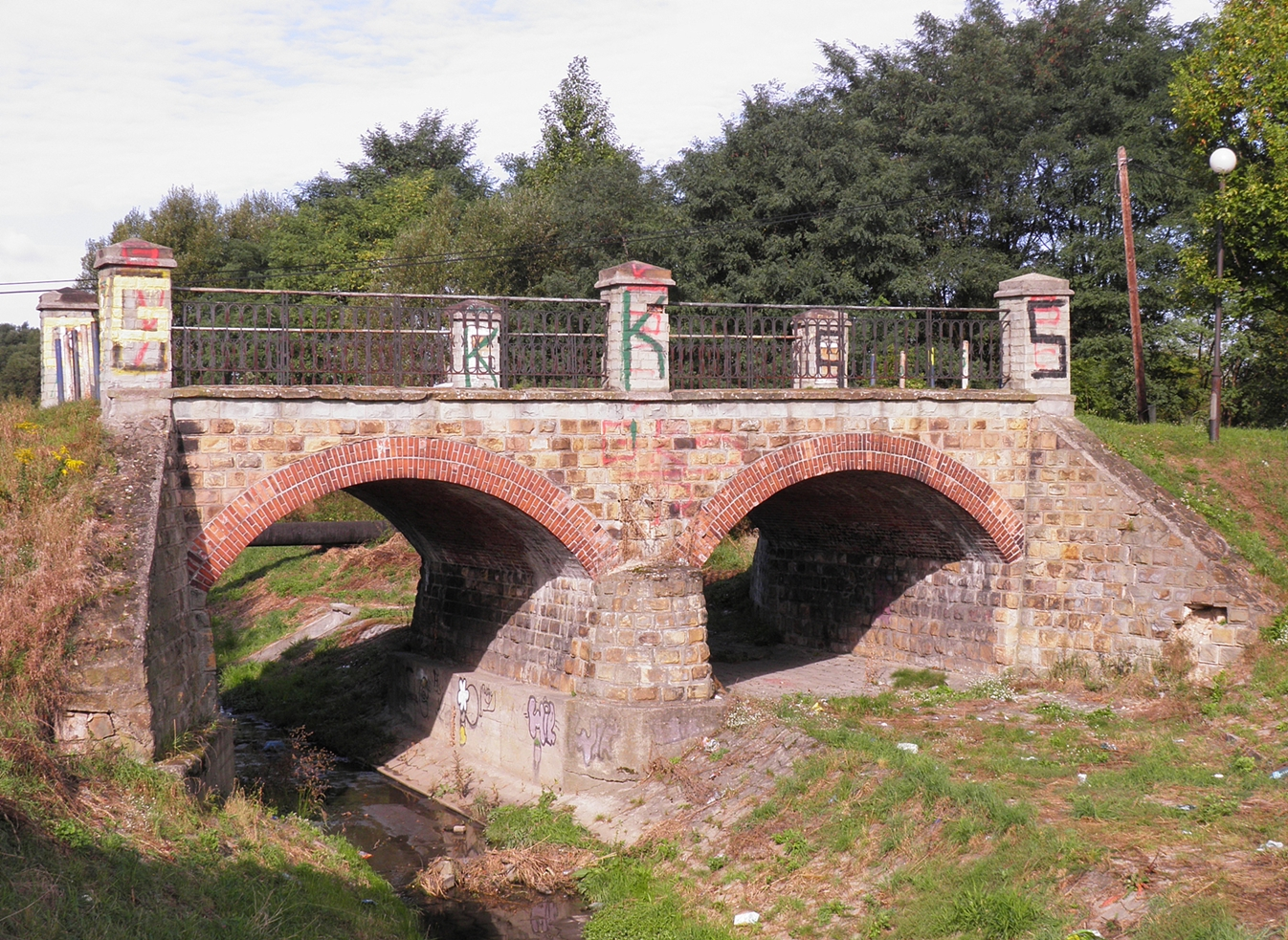 Most nad rzeką Mleczną Katowice, ul. Zaopusta, Katowice